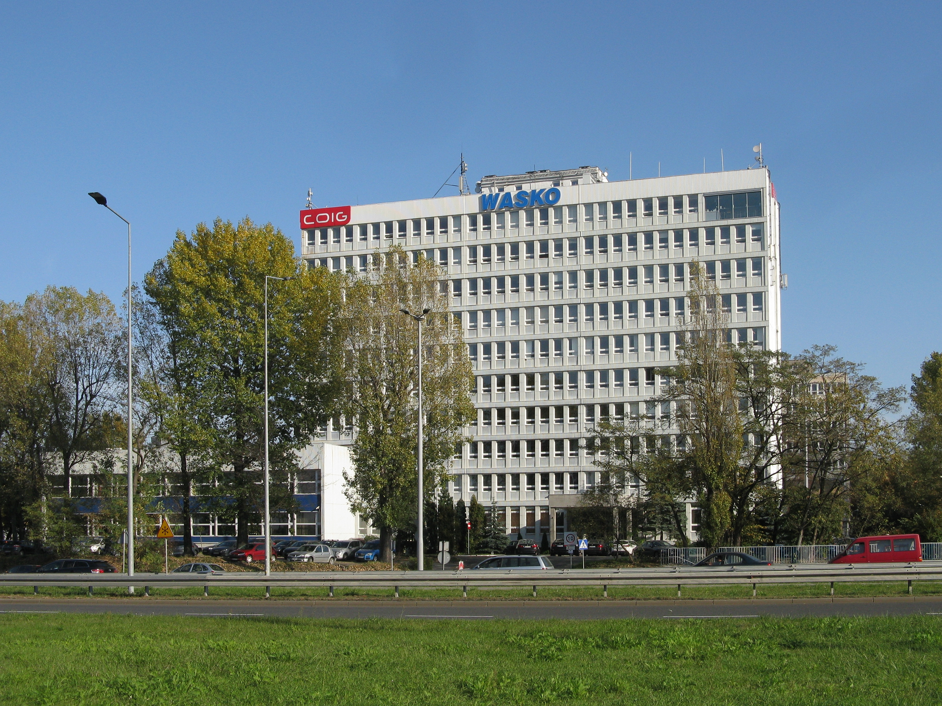 Biurowiec przy ul. Mikołowskiej 100 w Katowicach, siedziba COIG SA, część Grupy Kapitałowej Wasko SA.